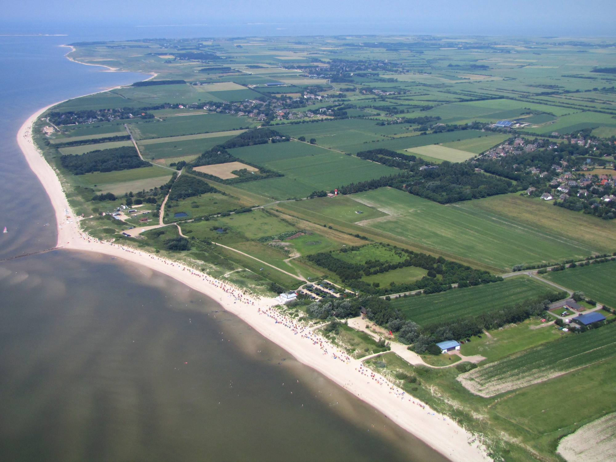 Aerial photograph of Föhr – One of the north sea islands - trying to find last visions of work with wikipedia question mark saying good bye wlm 2013 - photograph 2012 W. Pehlemann DSCN6106.jpg